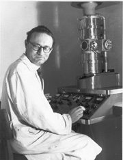 Il biofisico italiano Mario Ageno fotografato accanto al microscopio elettronico a trasmissione dell'Istituto Superiore di Sanità